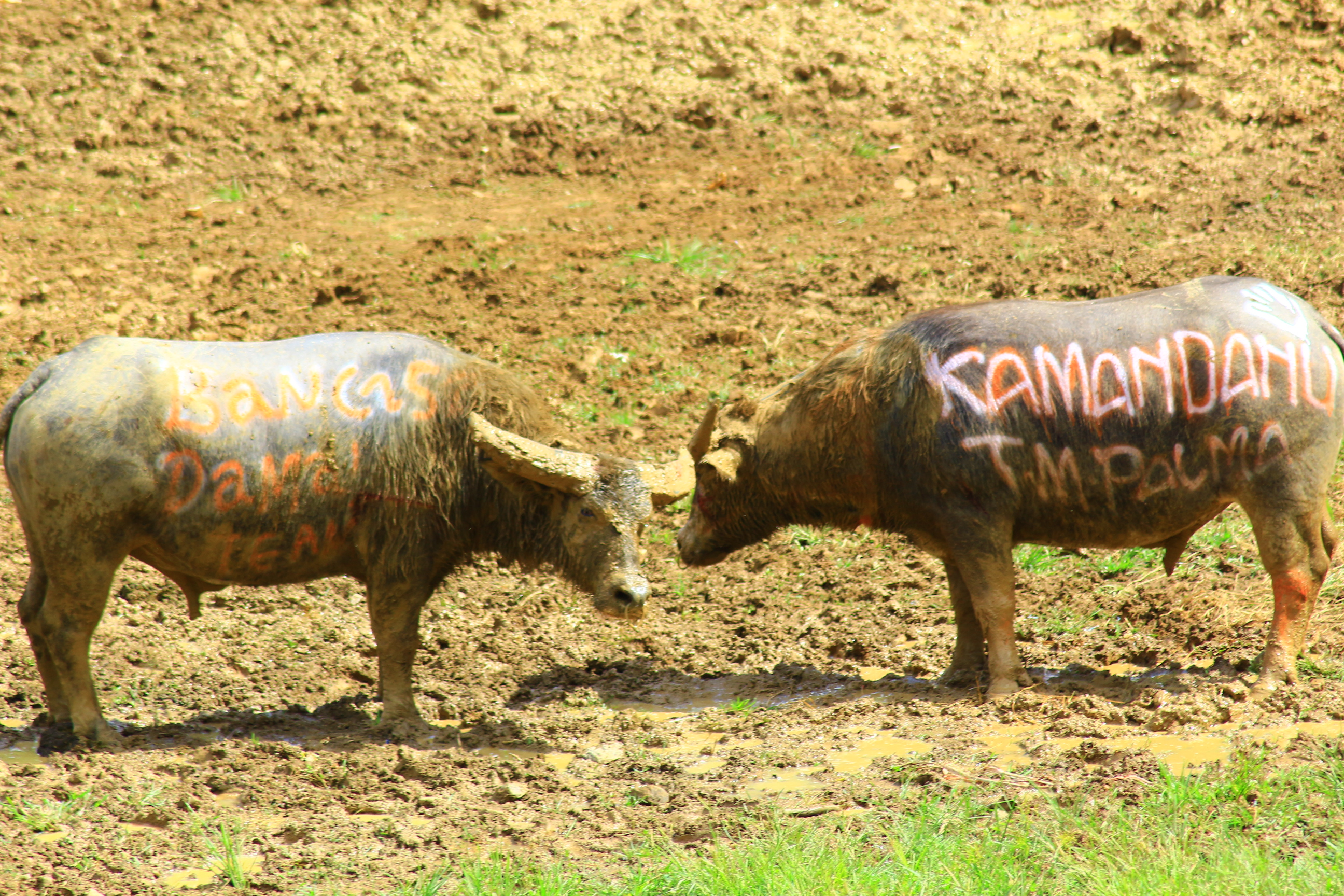 Silaga tedong tak lepas dari tradisi Rambusolo atau upacara kematian yang ada di Toraja, Sul-Sel. Tedong yang digunakan dalam silaga tedong ini adalah tedong laga atau tedong tarung khas dari toraja.